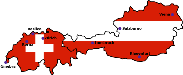 Título: Mapa de ciudades anfitrionas de la Eurocopa 2008 en Austria y Suiza (en español) Autor: B1mbo basado en Image:Flag of Austria.svg, Image:Flag of Switzerland.svg e Image:Euro2008 suisse autriche carte.png